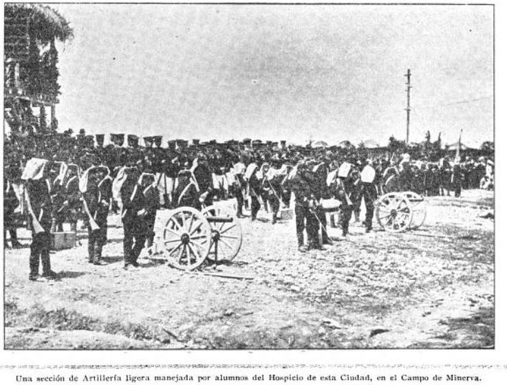 Práctica del tiro al blanco durante las fiestas minervalias en 1907